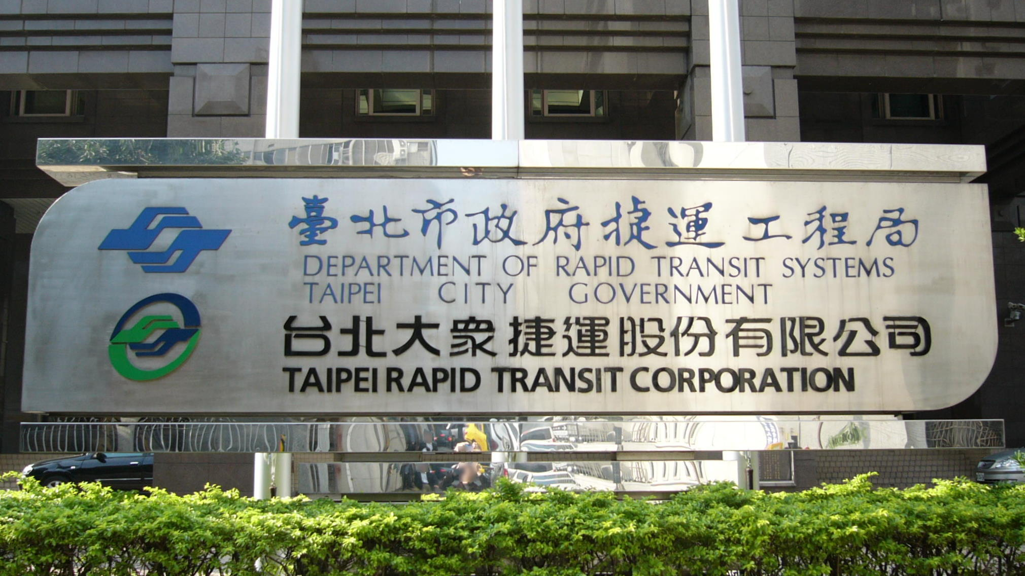 中文（台灣）: 捷運行政大樓旗桿基座，台北市政府捷運工程局局徽與台北捷運公司商標牌。